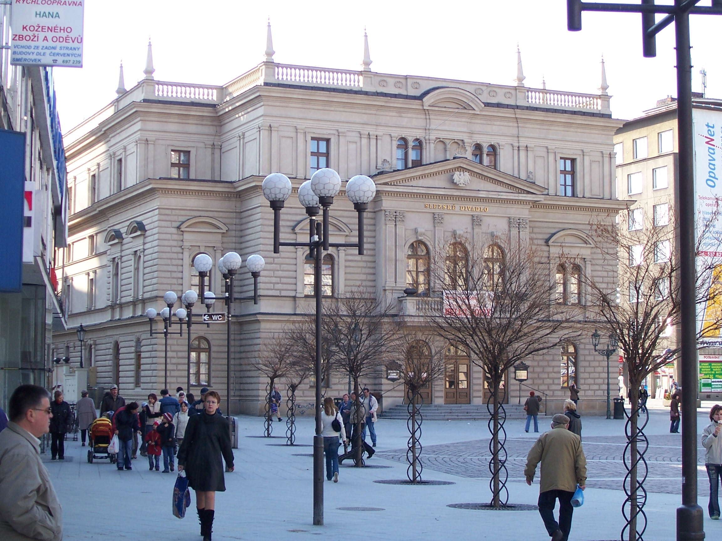 Budova Slezského divadla v Opavě